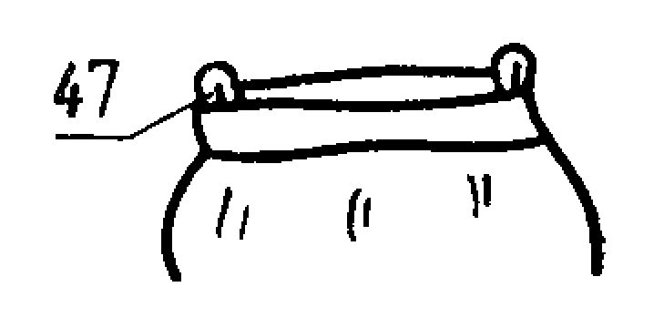 Изображение из ГОСТ 22977-89 (СТ СЭВ 6484-88) — Детали швейных изделий. Термины и определения.